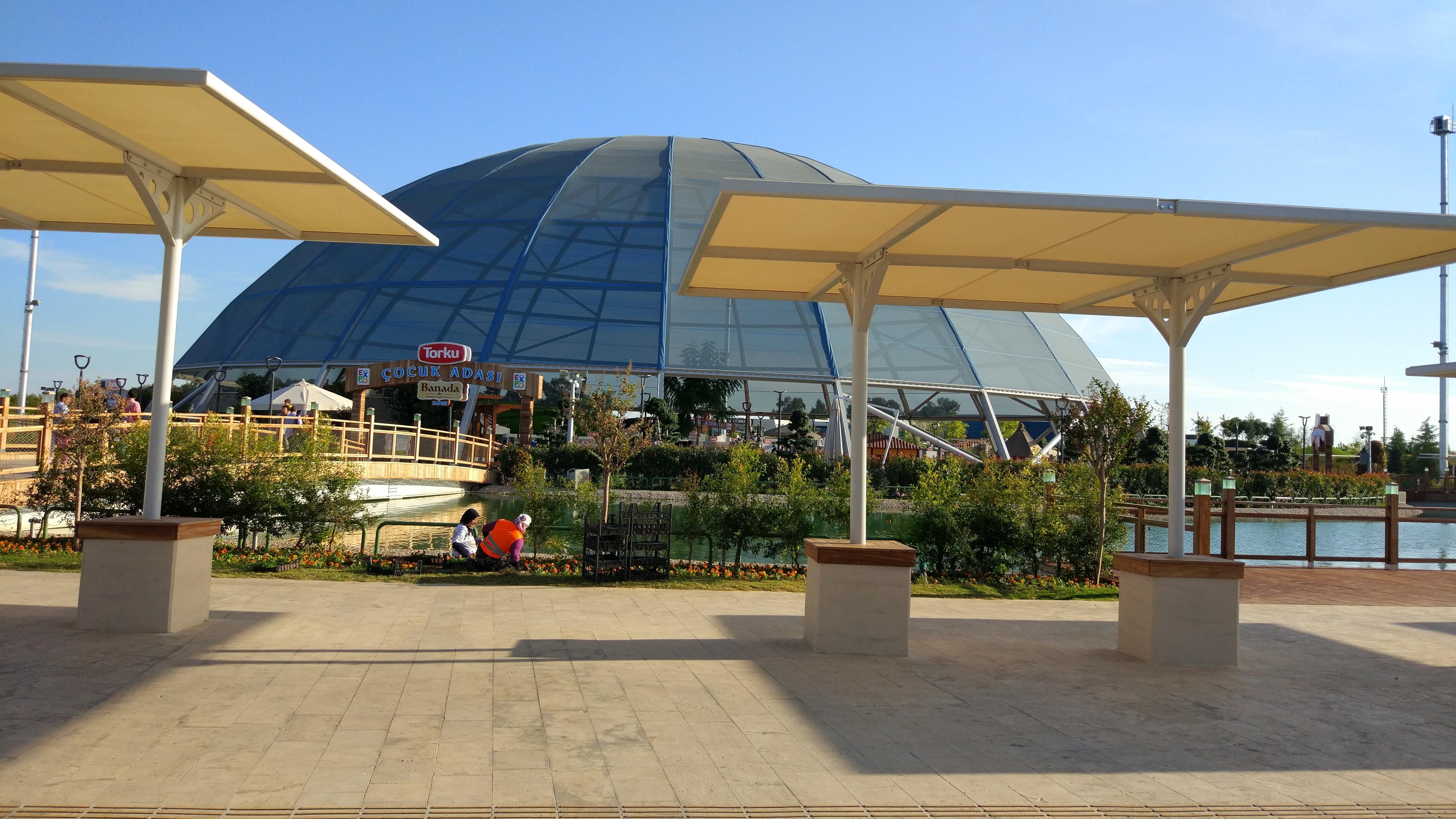 Çocukların çeşitli aktivitelere katılabileceği, yarım Dünya şeklinde tasarlanmış merkez.